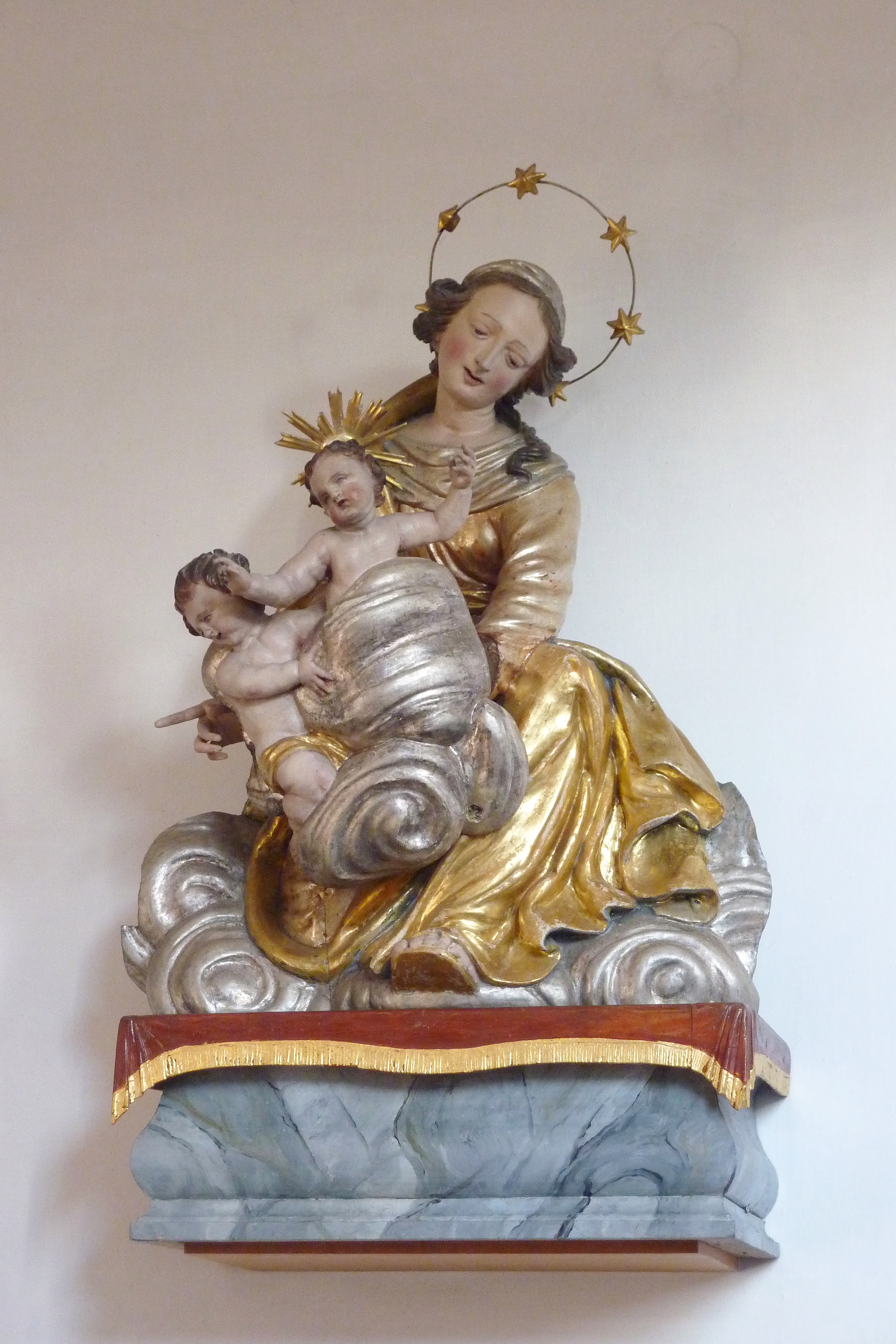 Katholische Pfarrkirche St. Ägidius in Schabringen, einem Ortsteil von Wittislingen im Landkreis Dillingen an der Donau (Bayern), Holzskulptur einer sitzenden Muttergottes mit Jesuskind in einer Wolkenwindel mit Putto, aus der 2. Hälfte des 18. Jahrhunderts